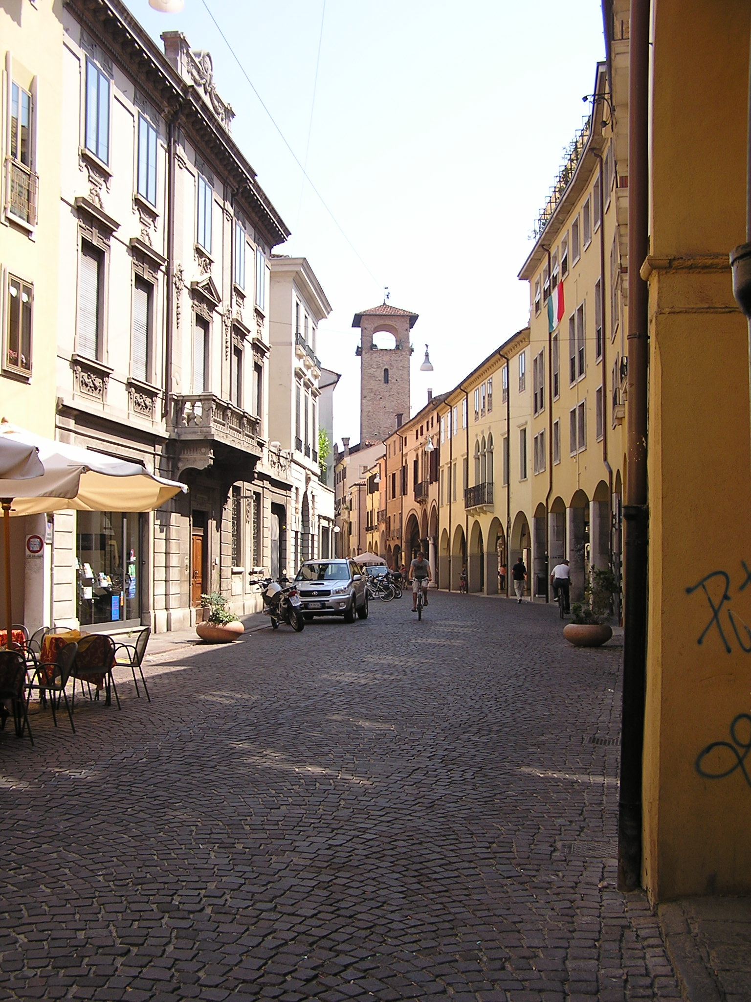 Rua Umberto I no centro de Pádua, Itália.